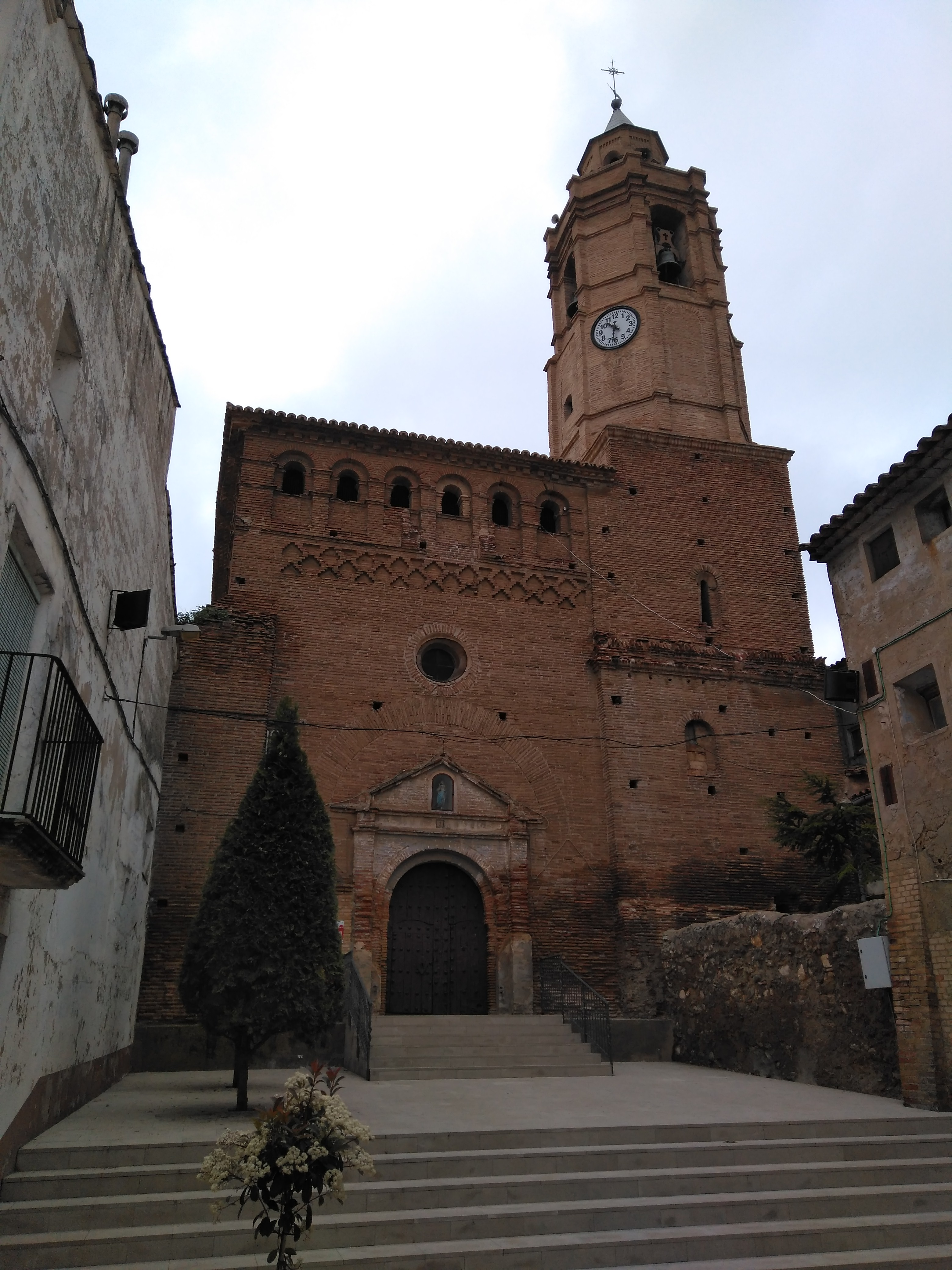 Església de Santa Margarida al Campell